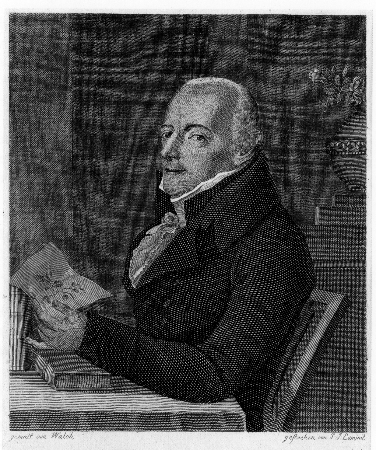 Portrait von Gottlieb Tobias Wilhelm